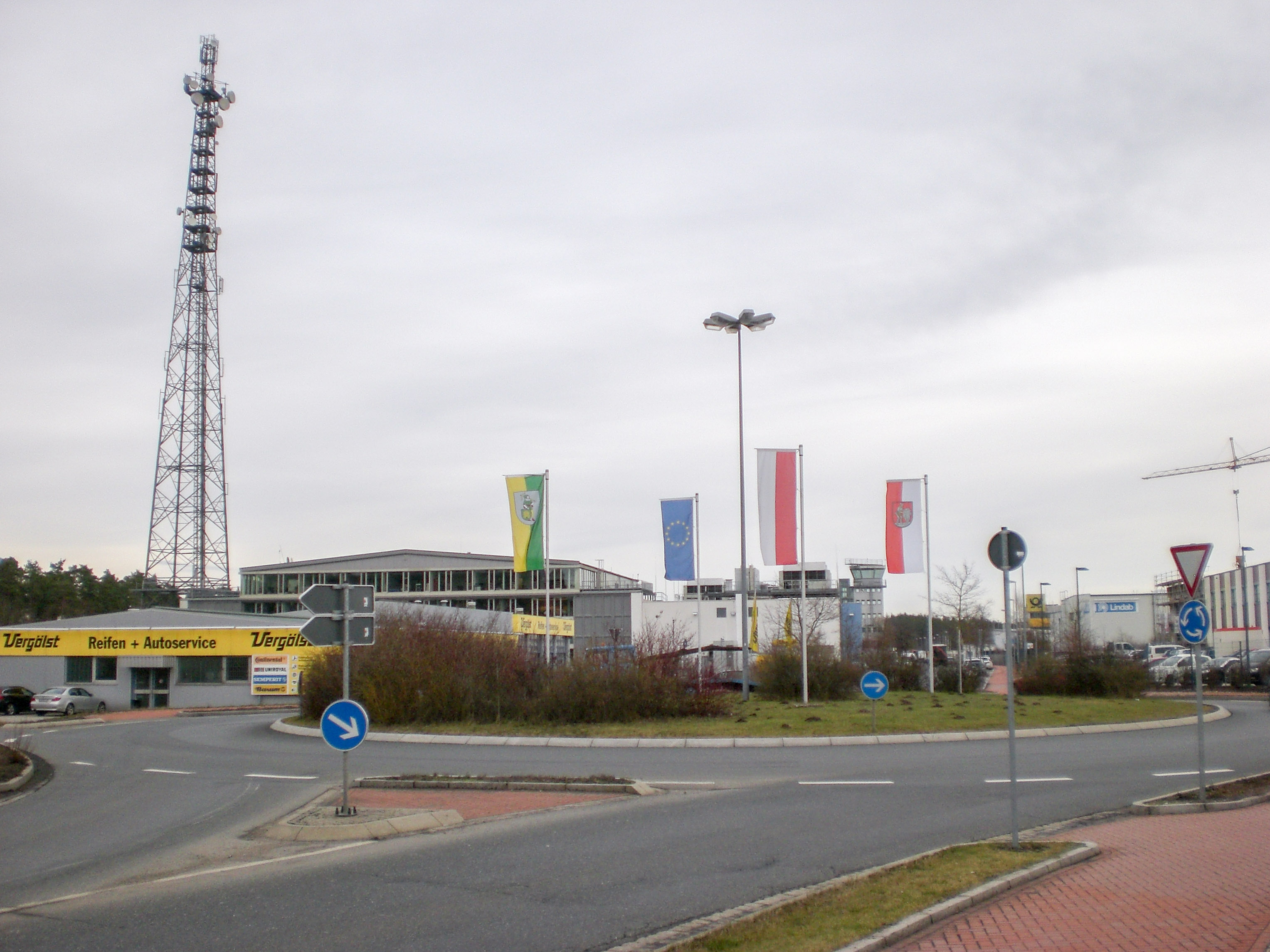 Gewerbepark Nürnberg-Feucht